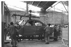 הרכבת רכב במפעל קייזר פרייזר 1951